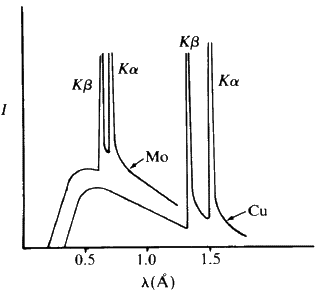 Rrezatimi